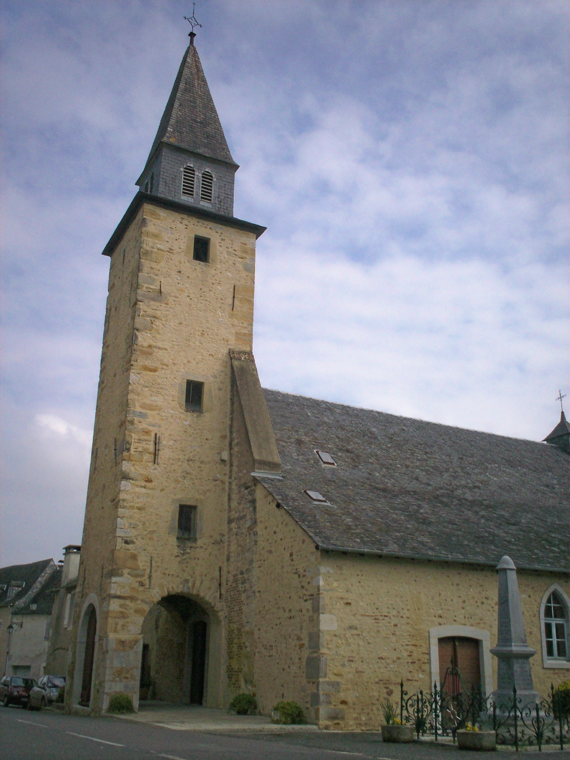 Glèisa de Cardessa